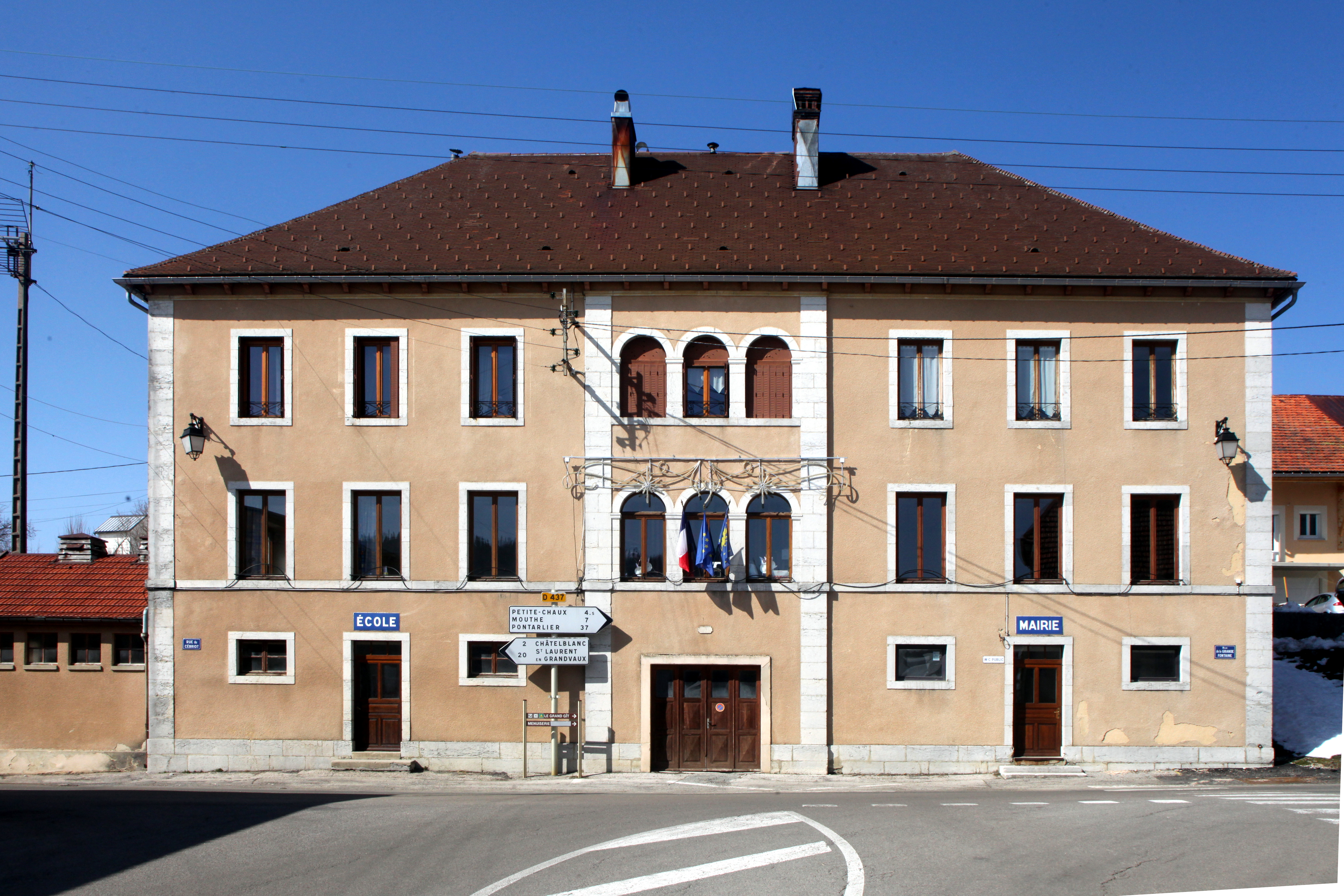 Mairie de Chaux-Neuve (Doubs).